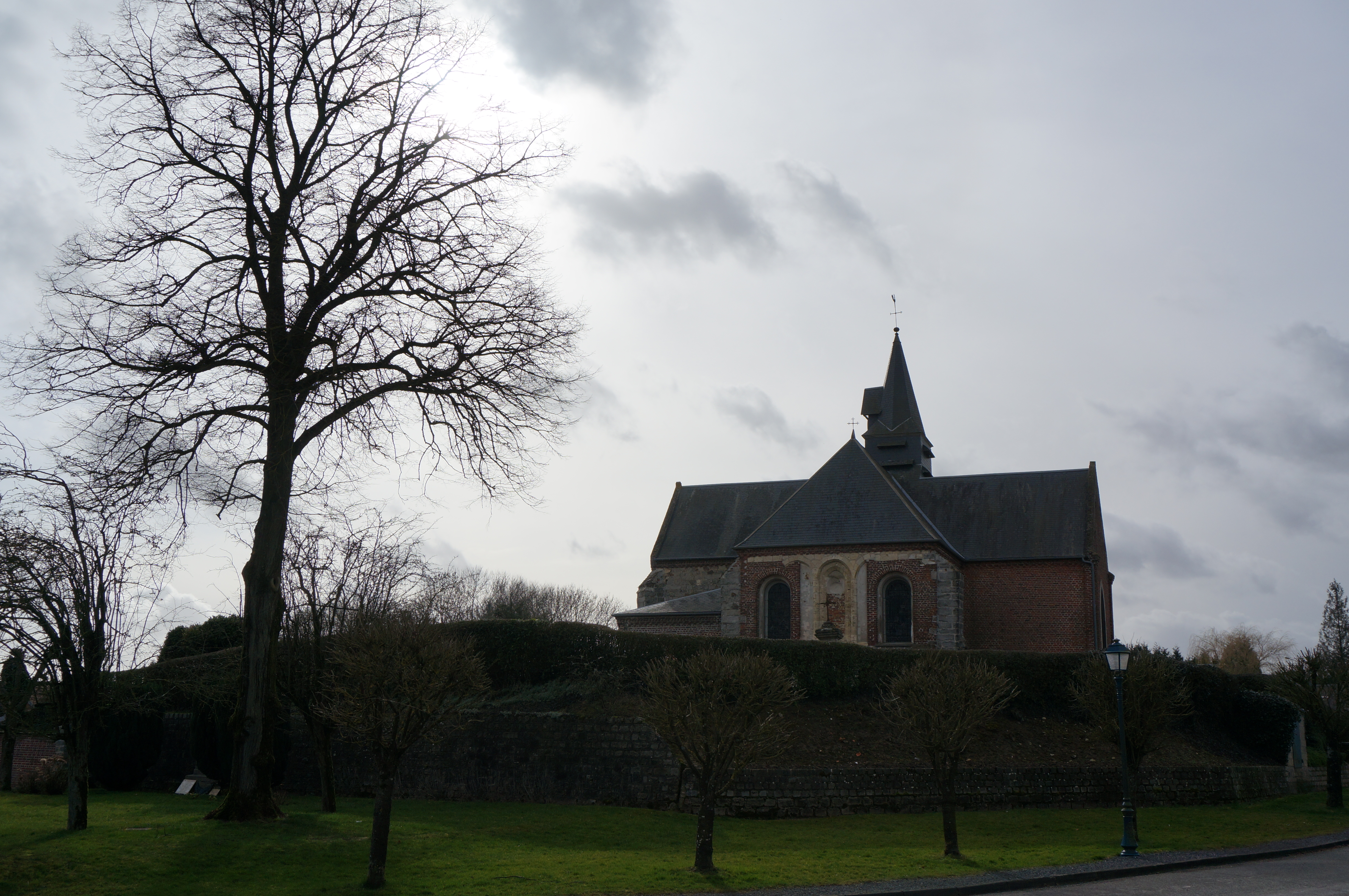 Prise de vue de Bois-lès-Pargny.